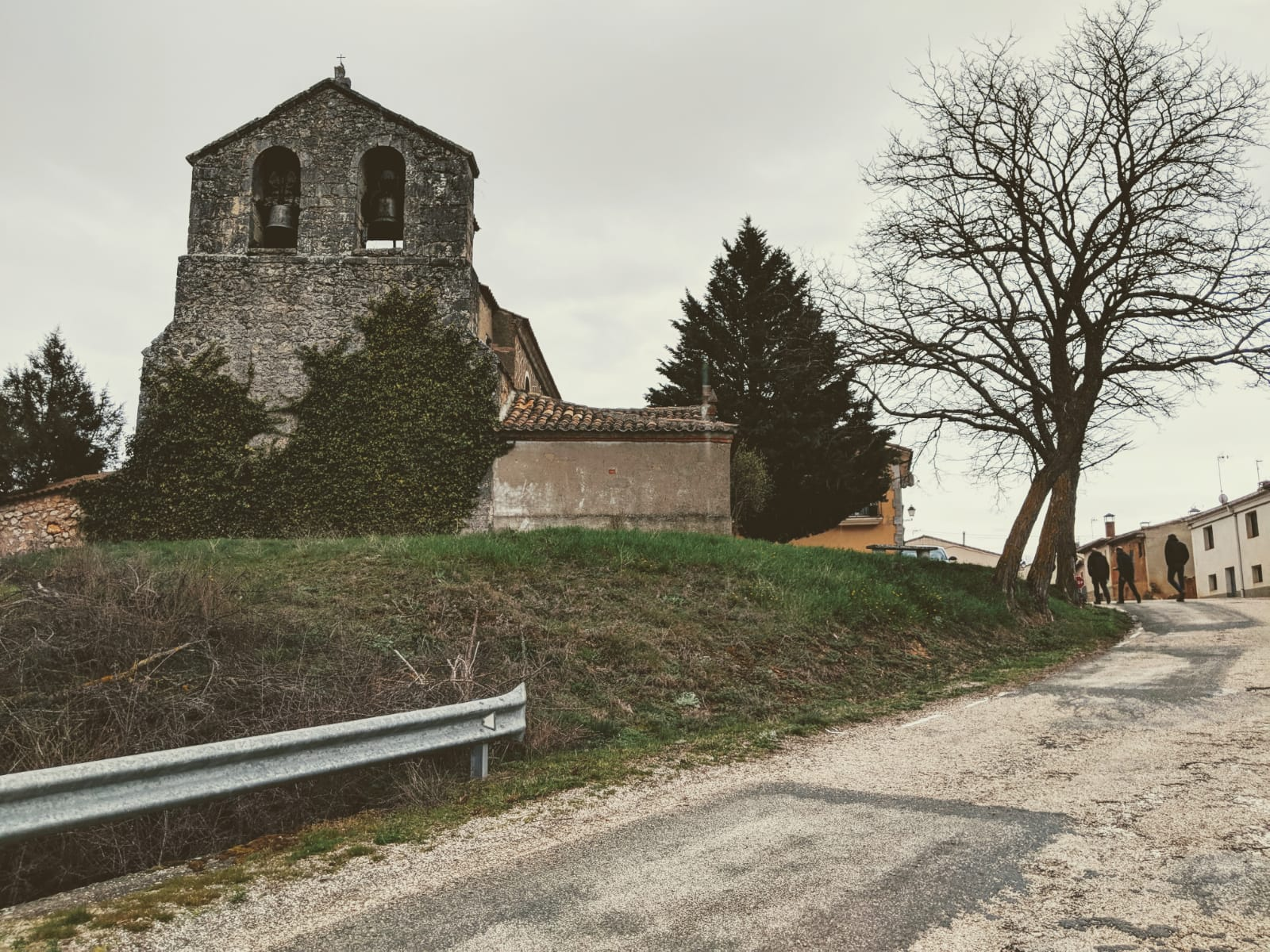 Valdemaluque (Soria). Iglesia